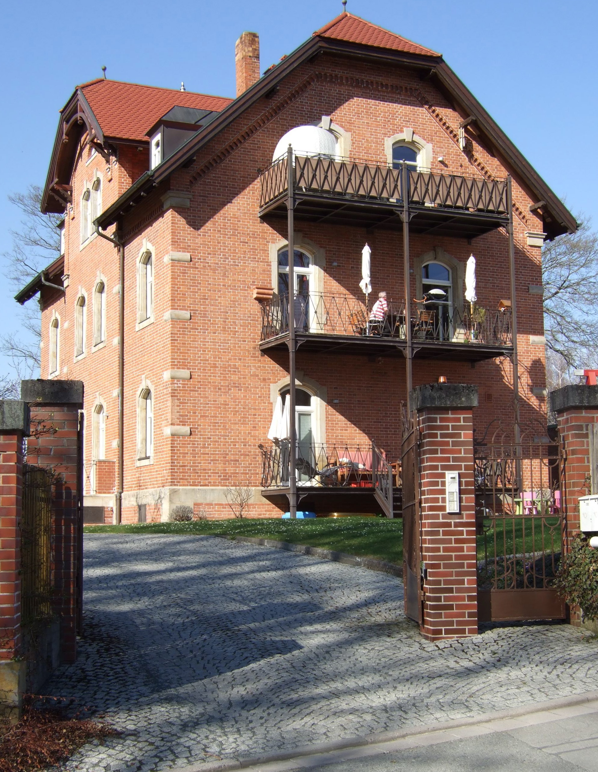 Bayreuth Siechenhaus